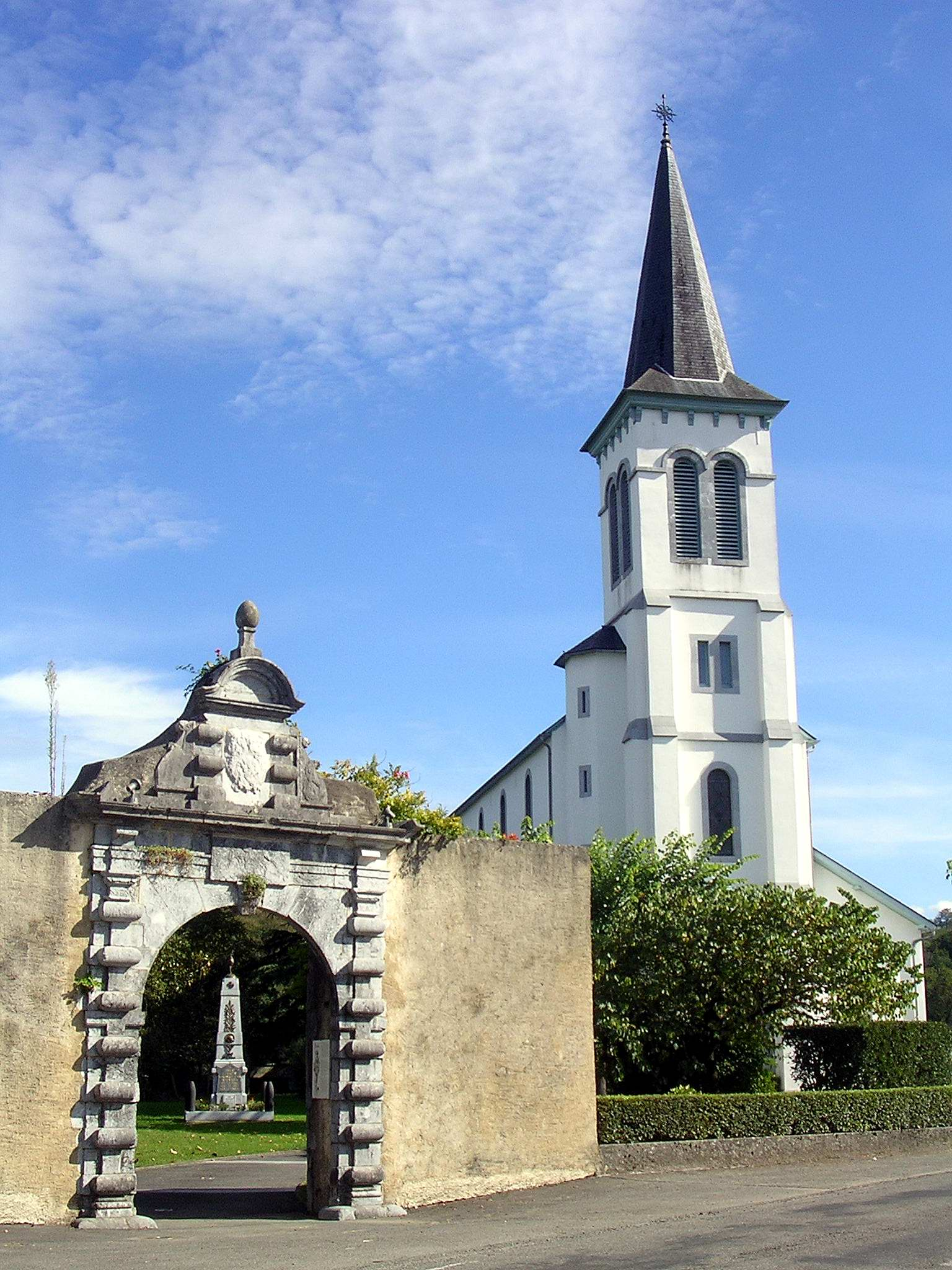 Porte de l'ancienne abbaye laïque d'Aramits et l'église paroissiale Saint Vincent (Pyrénées-Atlantiques, France)